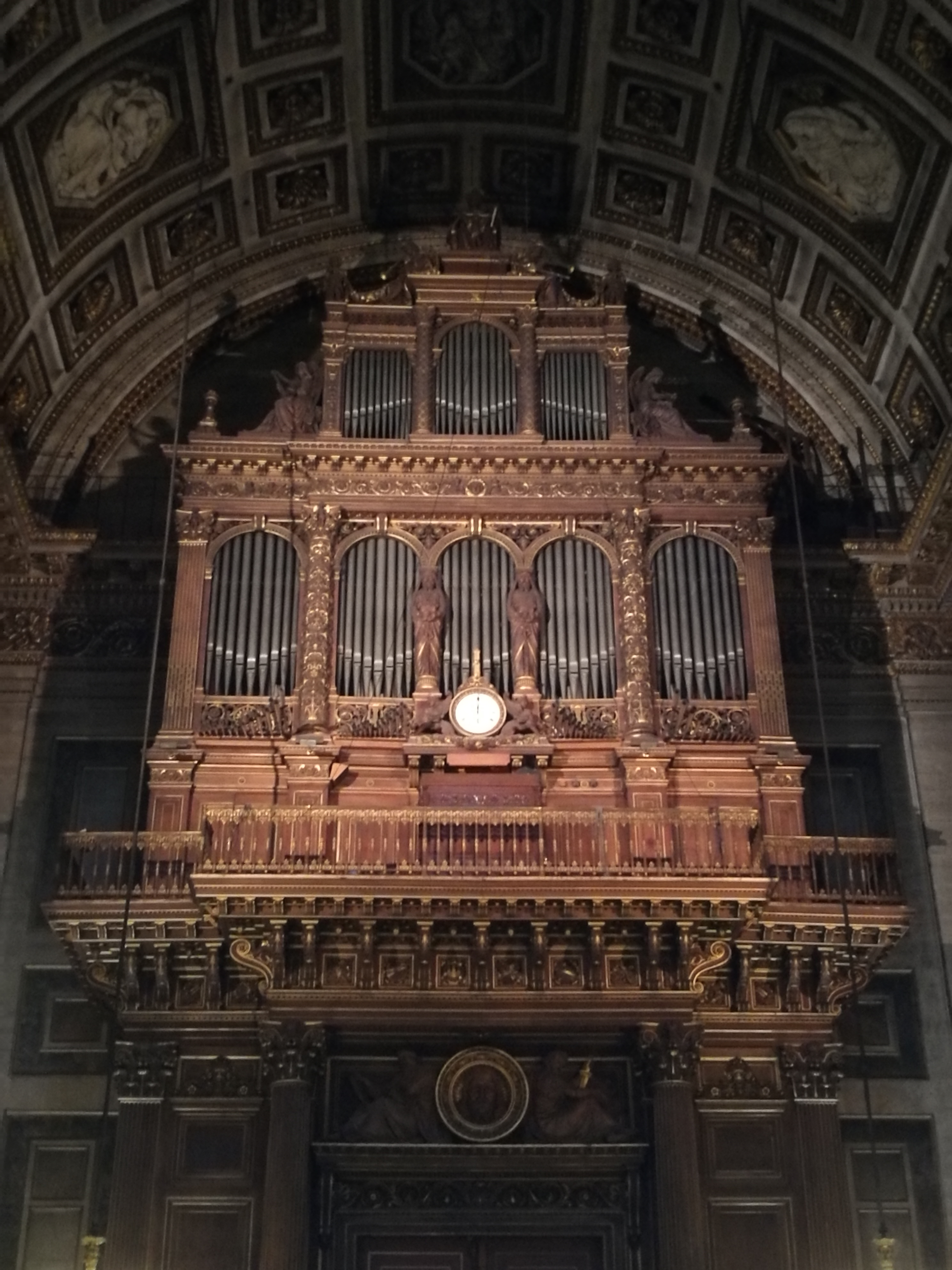 La Madeleine_Paris_Orgel